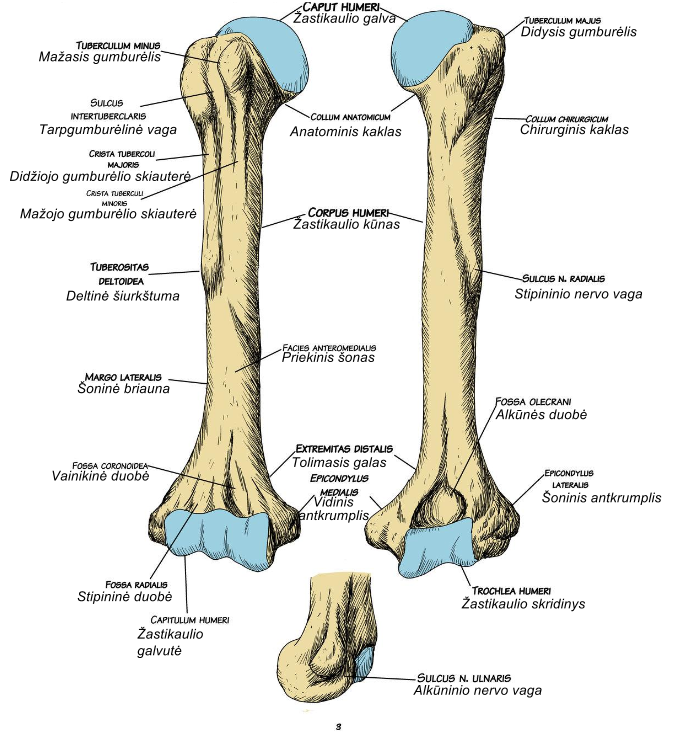 Čia surašytos žastikaulio dalys lotyniškai ir lietuviškai